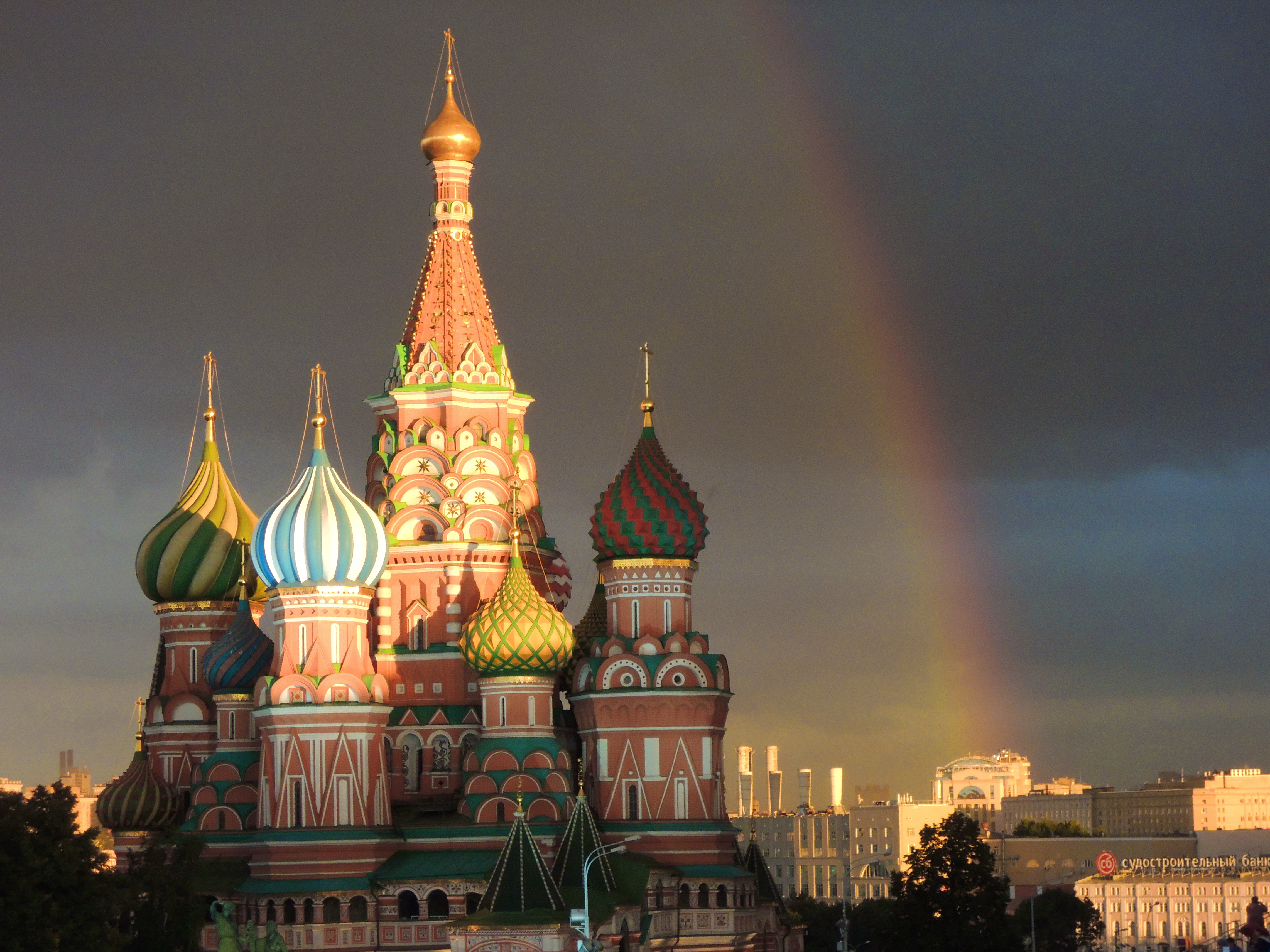 Спасская башня (фестиваль)